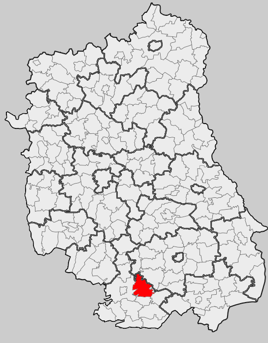 Map of gmina Tereszpol, Biłgoraj county, Lublin voivodship Mapa gminy Tereszpol, powiat biłgorajski, województwo lubelskie